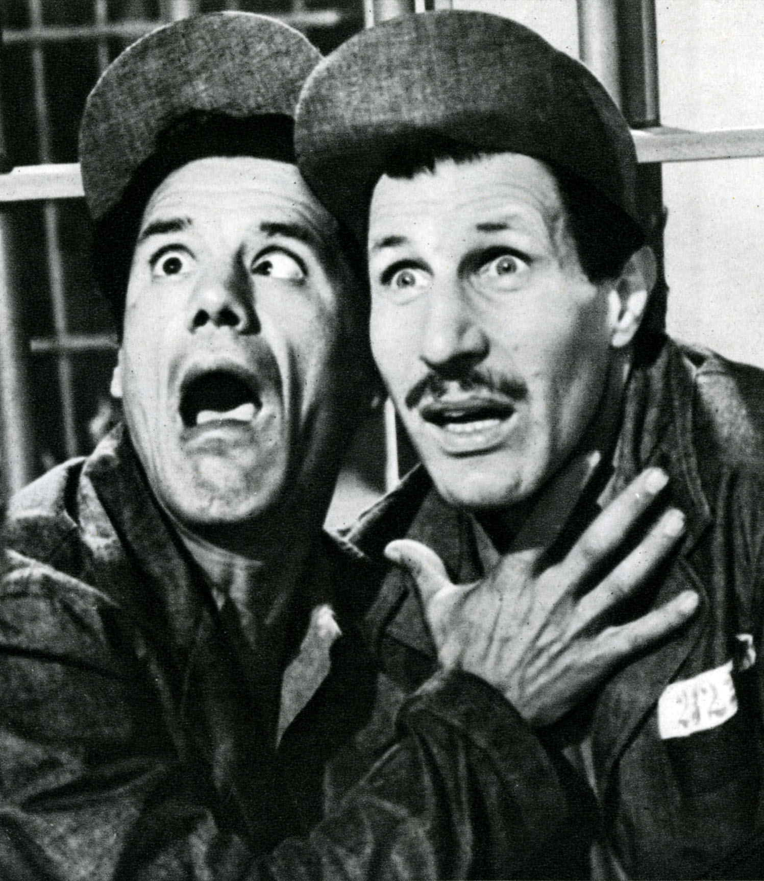 Italian comedy duo Franco Franchi and Ciccio Ingrassia